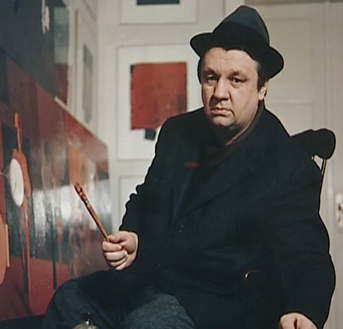 Miljenko Stančić